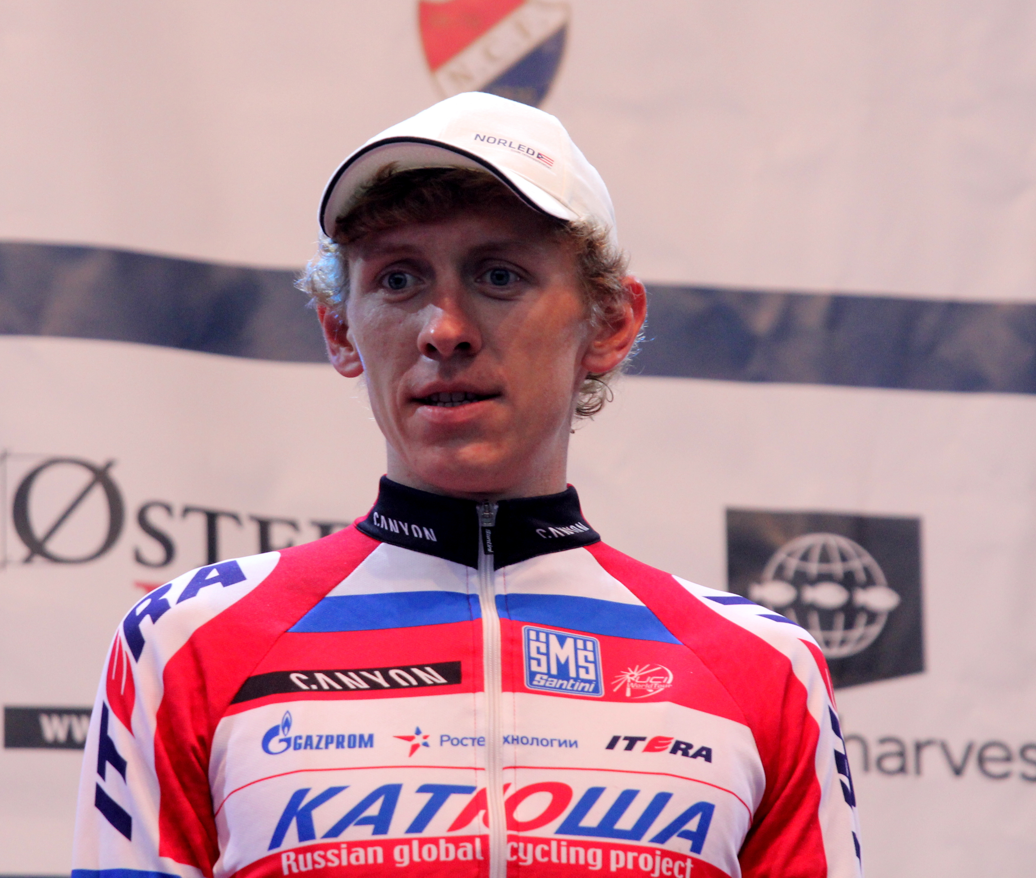 Timofej Kritskij under Tour des Fjords 2013